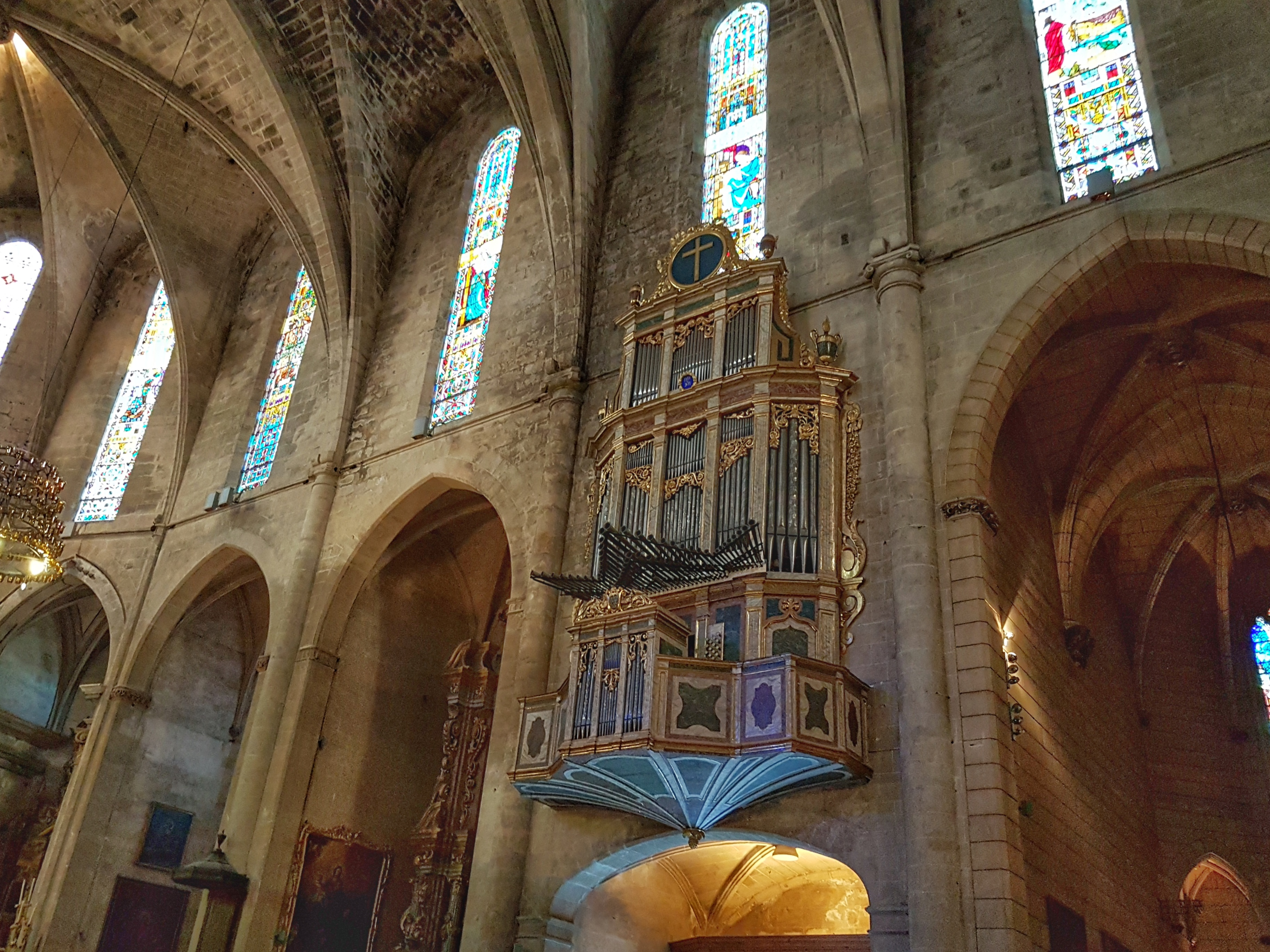 Vista general de l'orgue de la Parròquia de Santa Creu